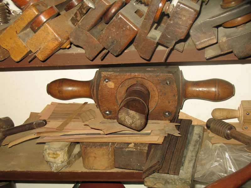 Snittøj